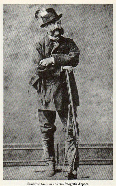 "Auditore" Politico Austriaco. Funzionario della Giustizia e Generale Austriaco. Fu Inquisitore dei MARTIRI DI BELFIORE, col grado di Tenente. Venne definito il "mal genio dei processi" contro i patrioti Italiani